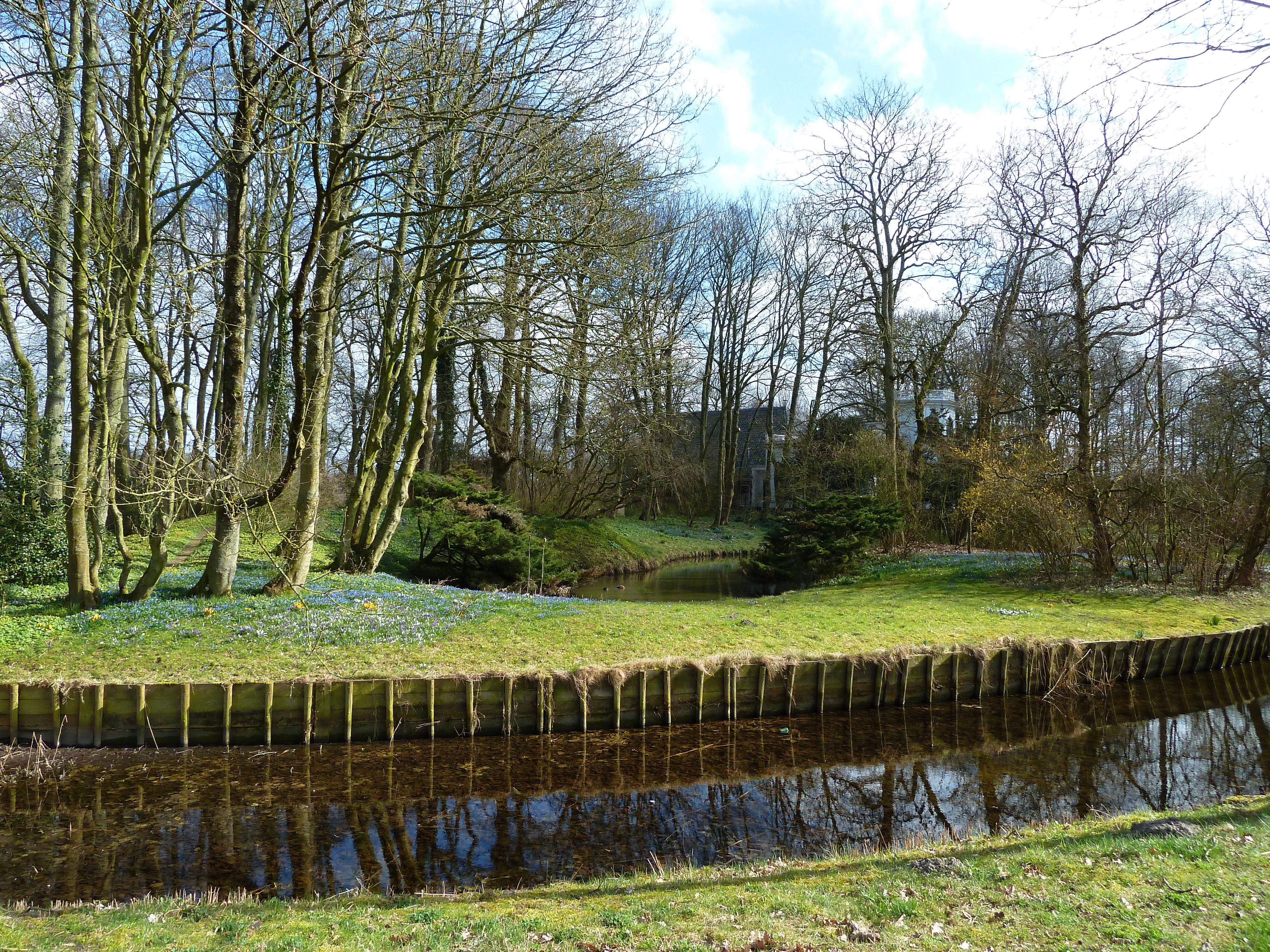 Deel van de tuin van de burgemeestersvilla in het Groningse dorp Rasquert in de lente.